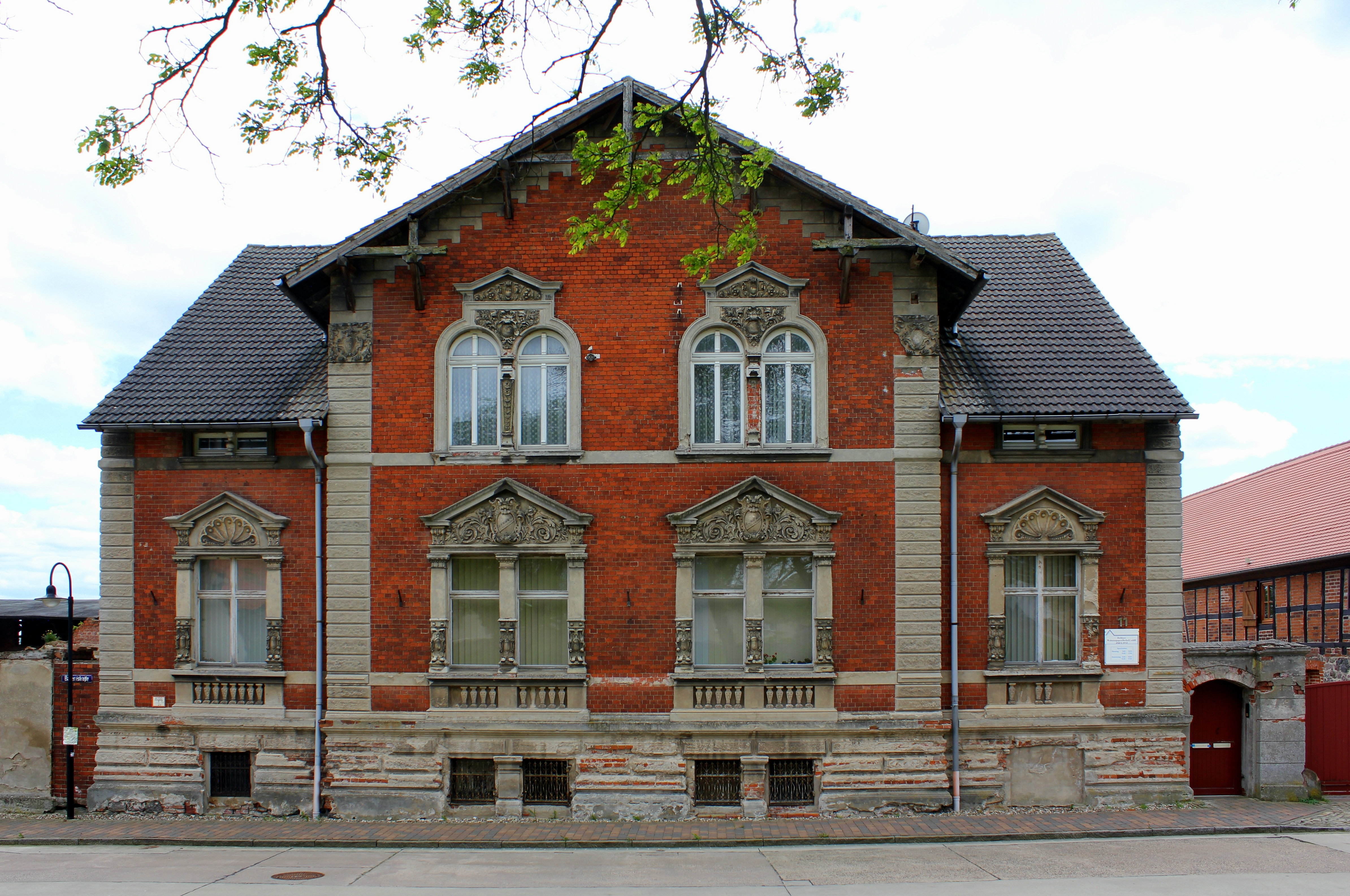 Bauernhof, Bauernstraße 11, Zielitz